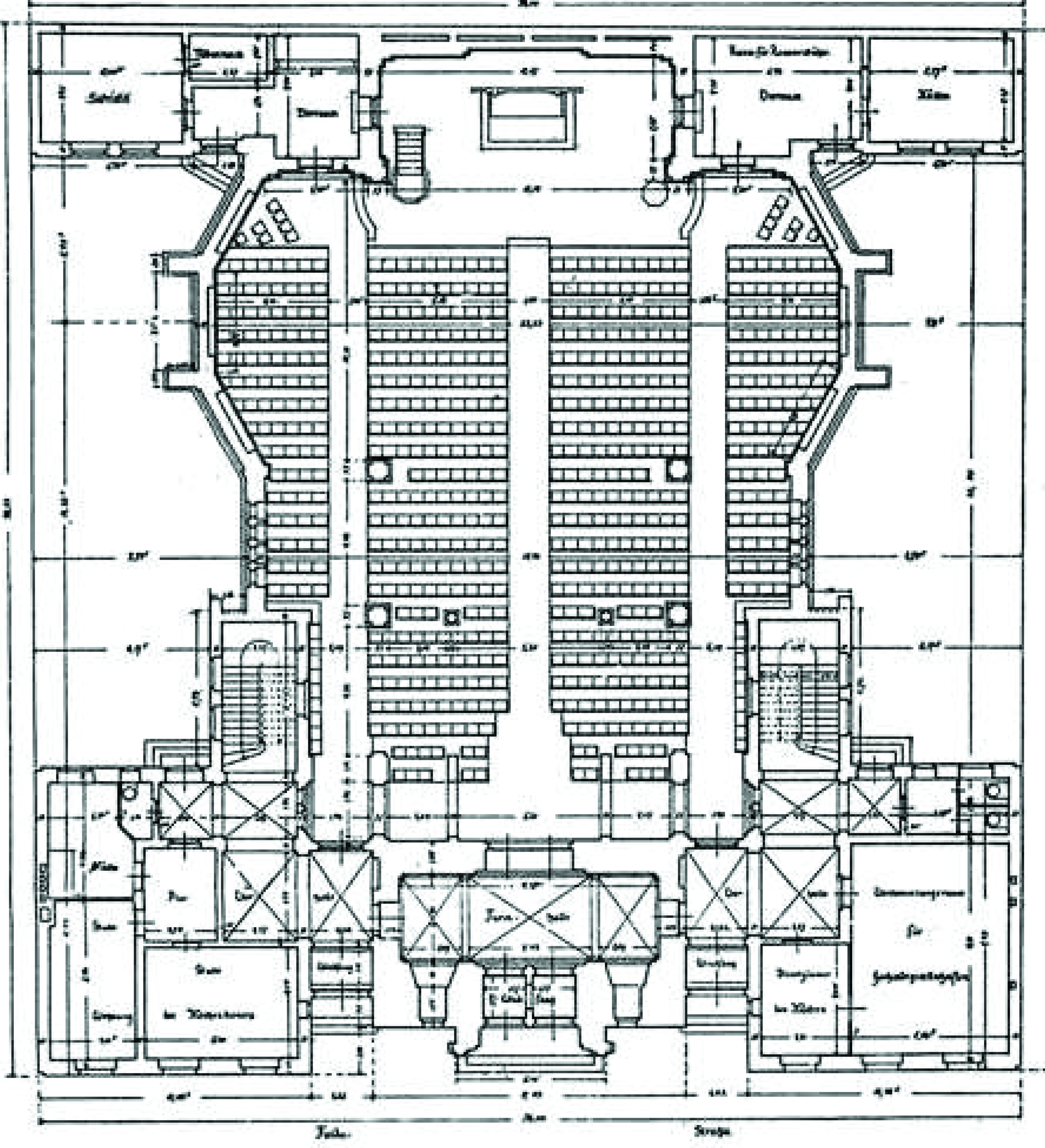 eingescannter Grundriss der 1908-1909 erbauten Martin-Luther-Kirche in Berlin-Neukölln, Fuldastraße 50